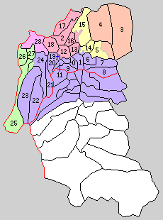 長野県北佐久郡の町村。